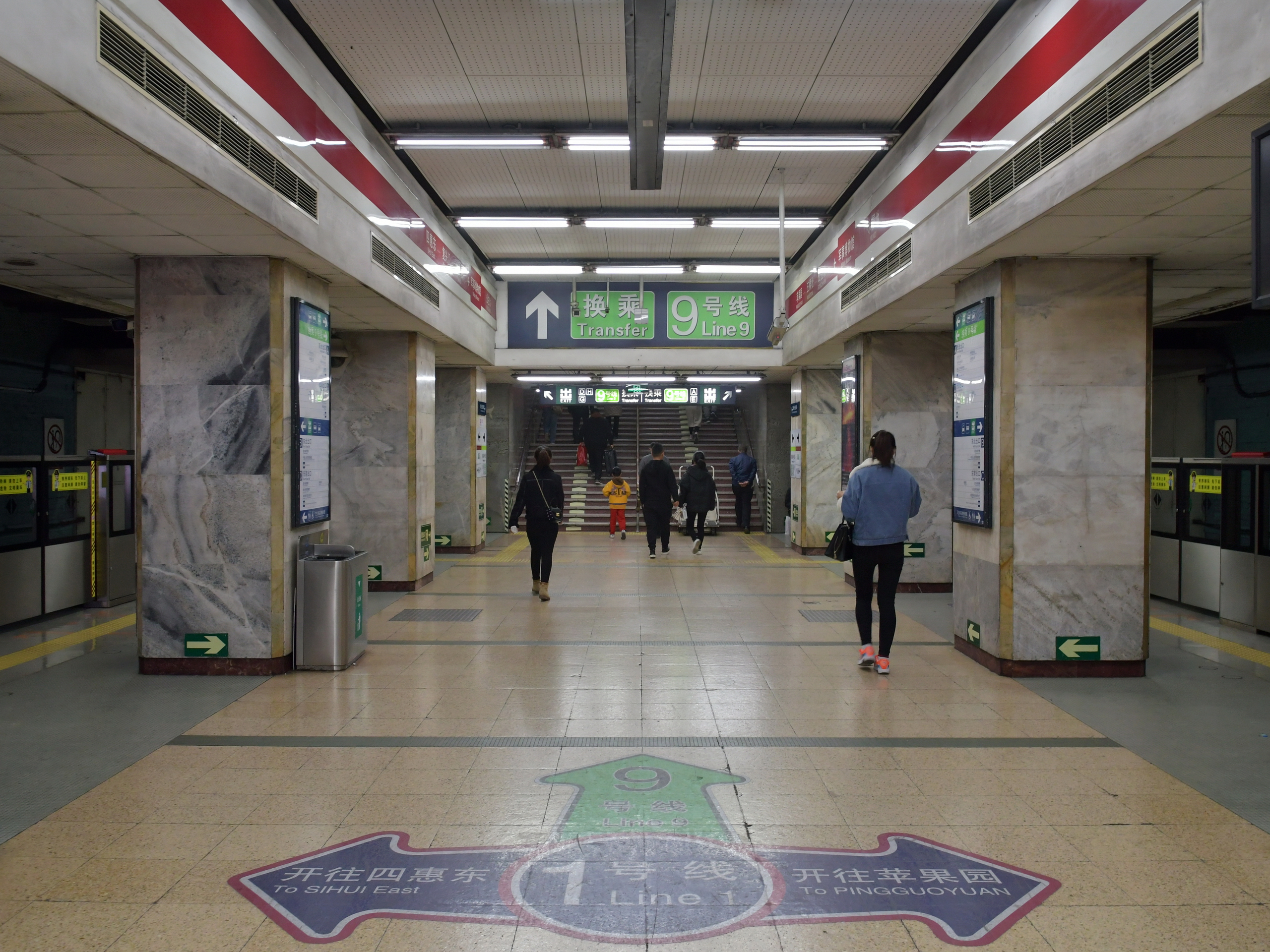 北京地铁1号线军事博物馆站站台